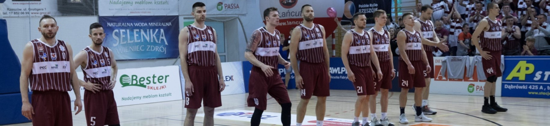 Prezentacja Spójni Stargard (17.05.2018)